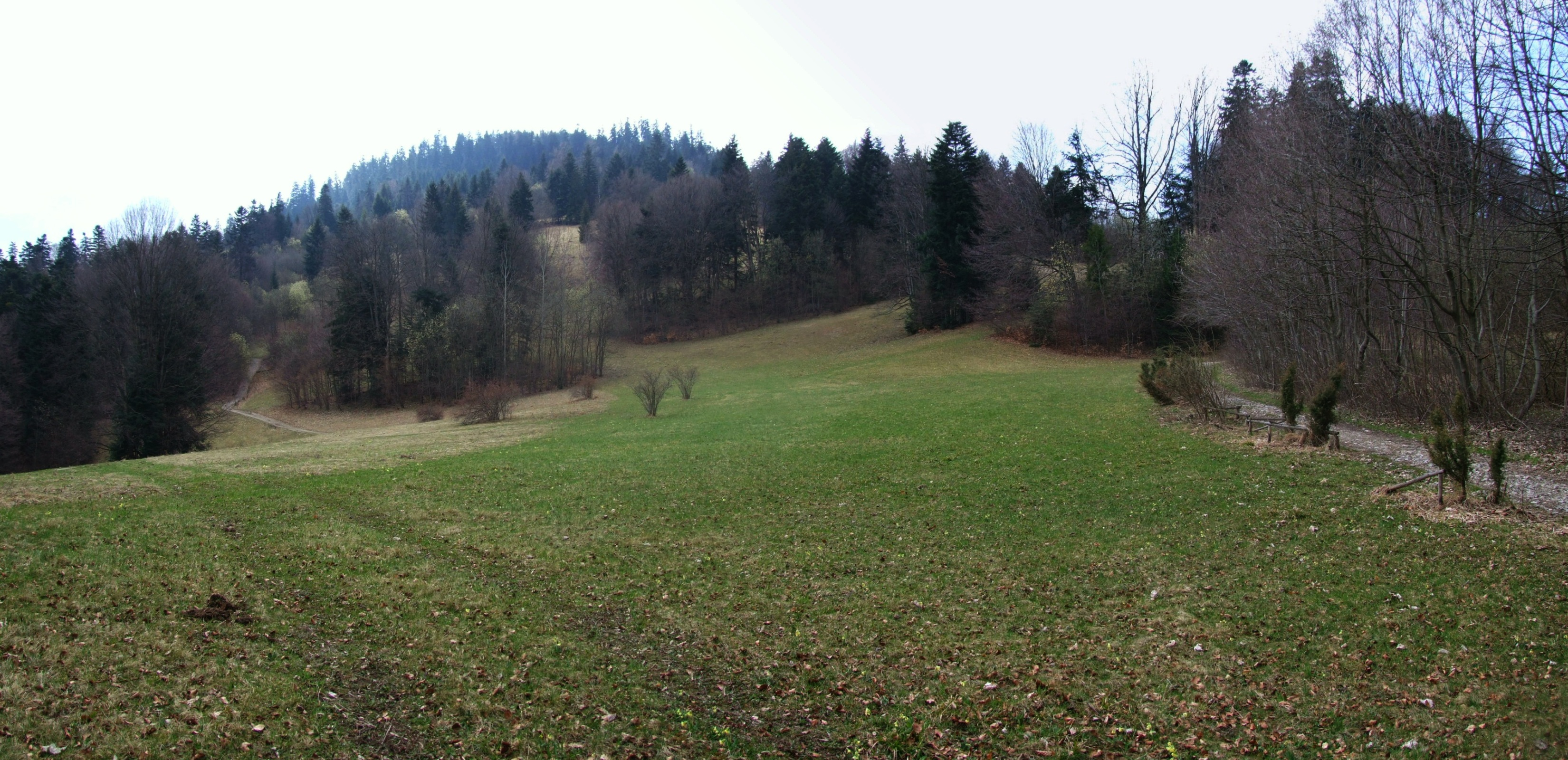 Polana Wyrobek w Pieninach